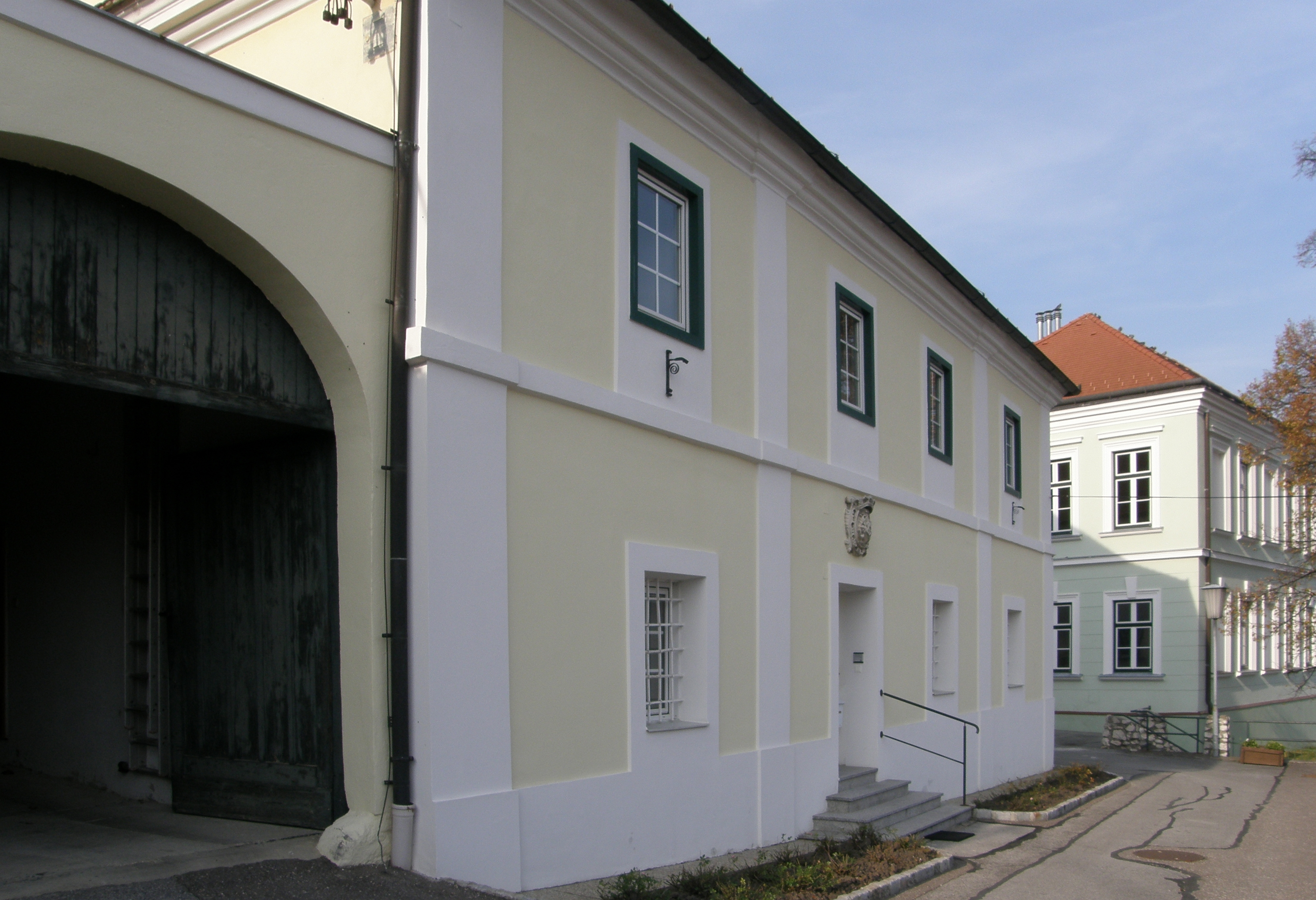 Pfarrhof